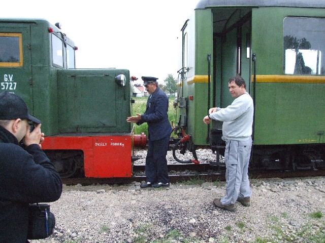 Balatonfenyvesi Gazdasági Vasút a Somogyszentpáli végállomáson.